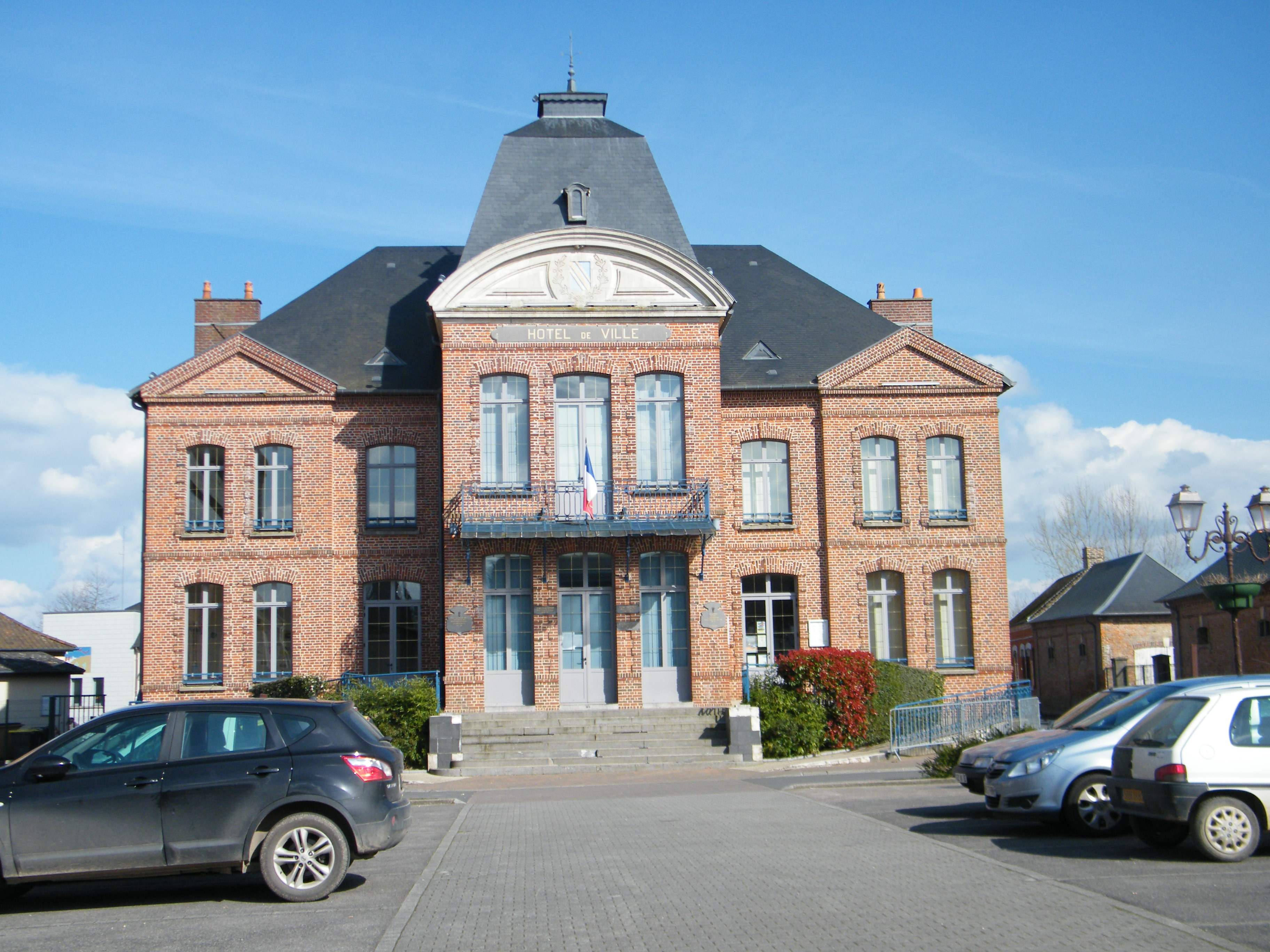 La mairie.